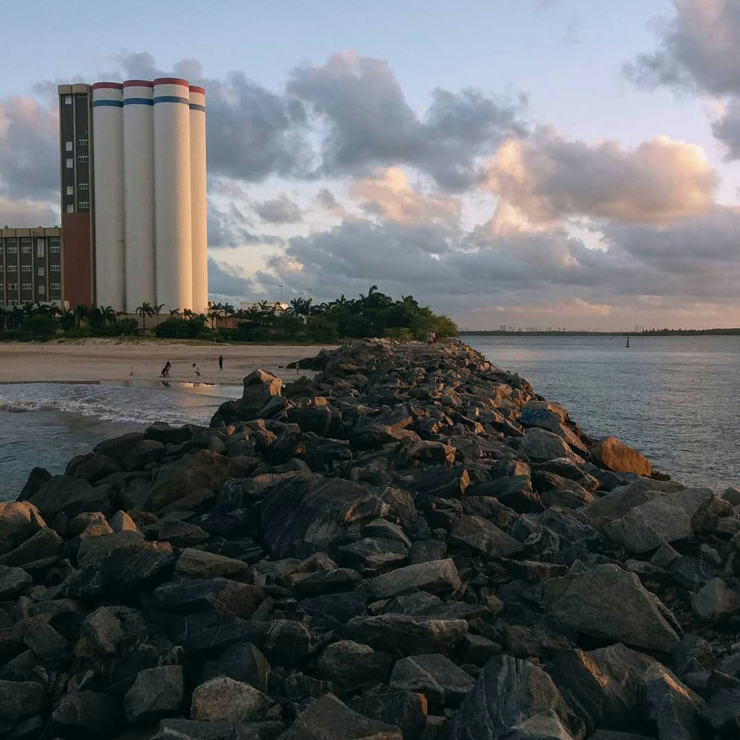 Foto tirada a partir do quebra-mar localizado em Cabedelo, Paraíba. Visão voltada ao sul, com visão do Rio Paraíba à direita; e ao Grande Moinho Tambaú à esquerda.